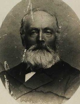 Forstander ved Odense Seminarium Niels Thomsen, 27.05.1840-12.06.1920.